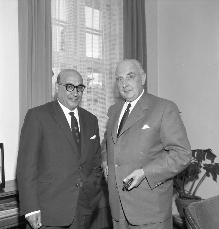 Der iranische Staatssekretär im Landwirtschaftsministerium, Dr. Esfandiari, bei Staatssekretär Sonnemann, BML